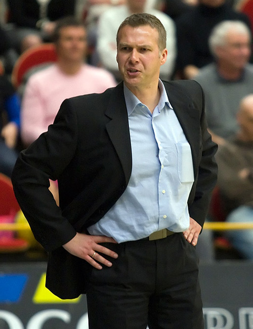 Herman van den Belt coach van Landstede Basketbal tijdens de eerste wedstrijd van Landstede Basketbal tegen BSW Weert